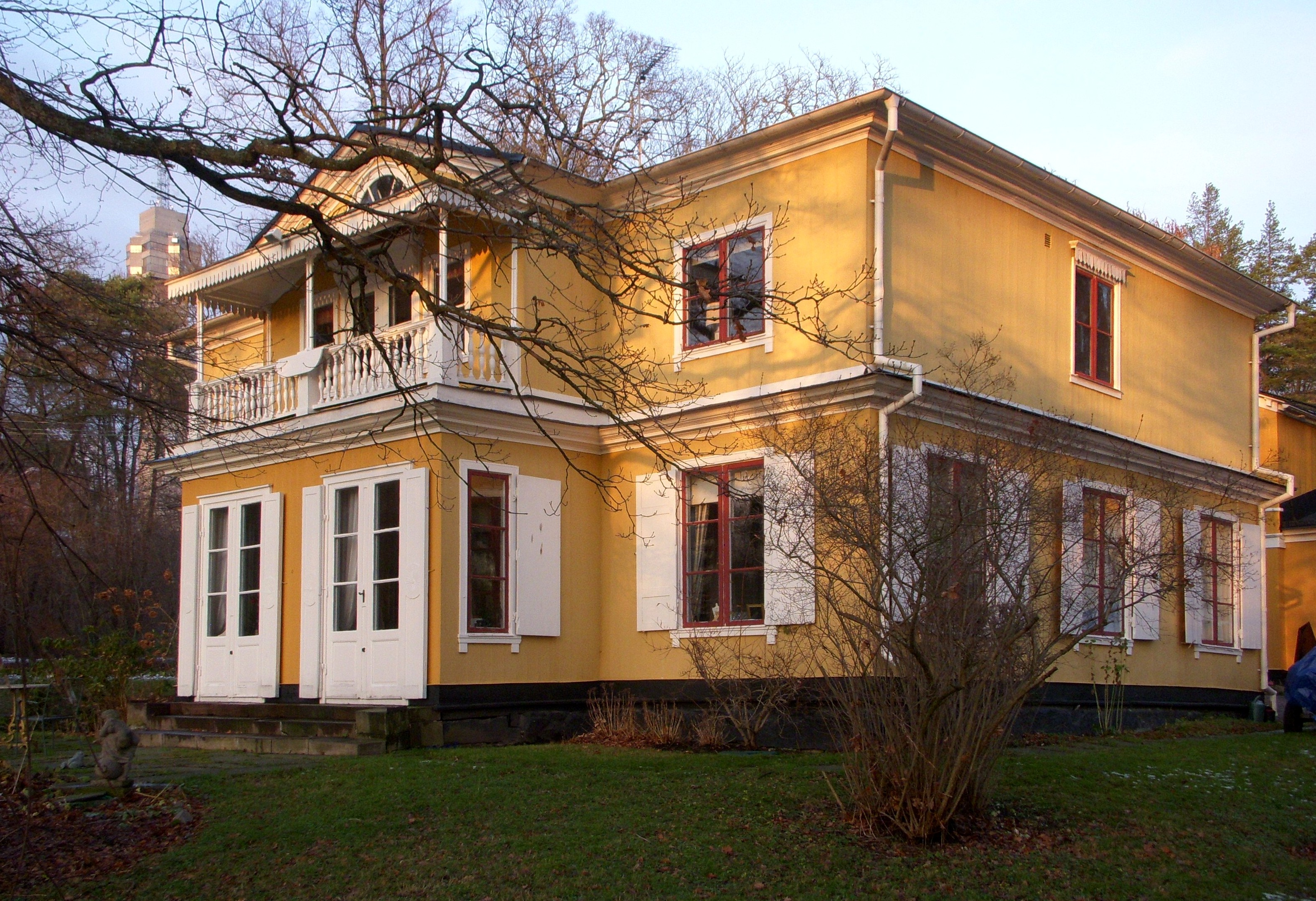 Bergshyddan på Djurgården, fasader mot sydväst och syd